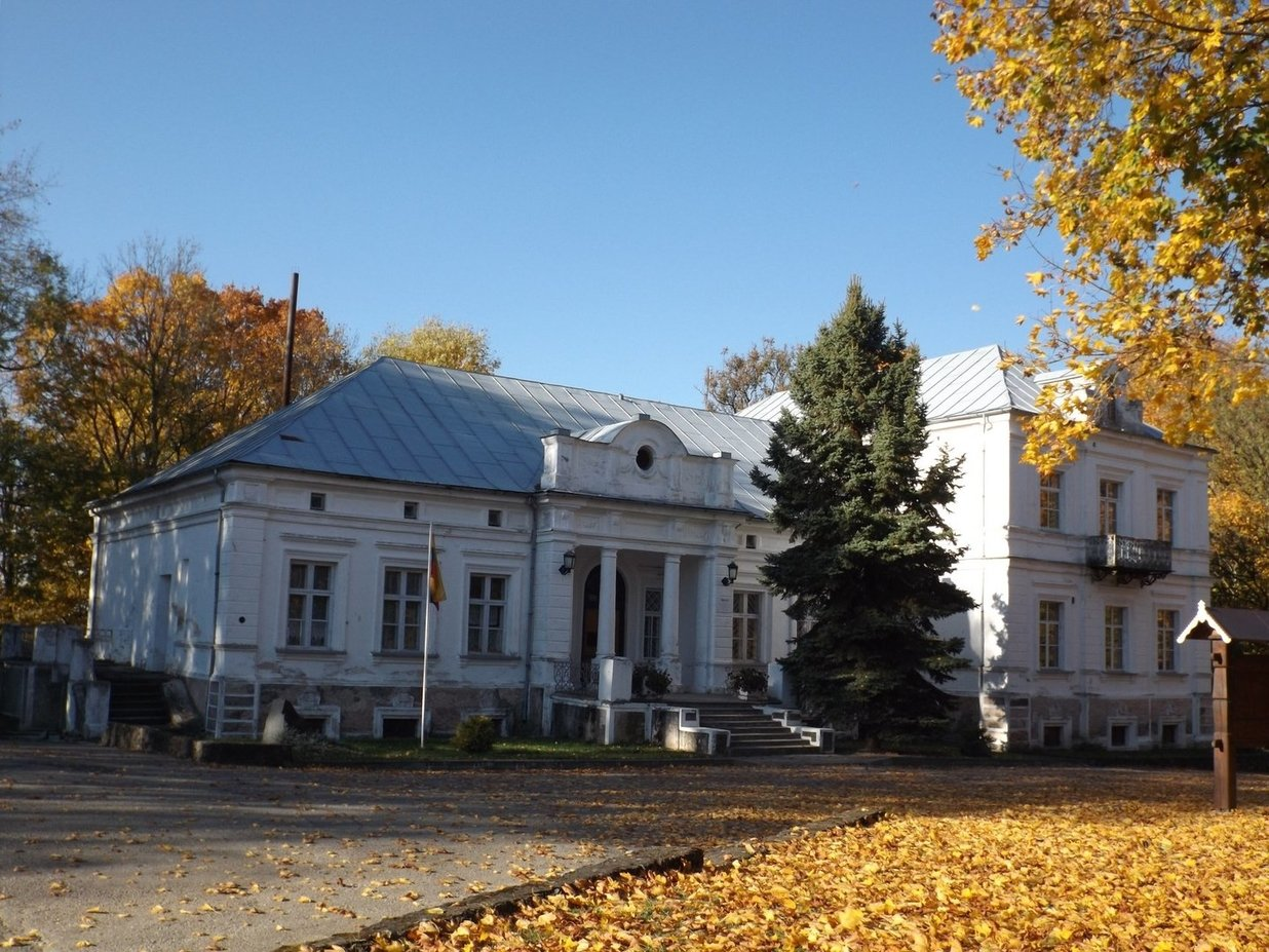 Noriūnų dvaro rūmai